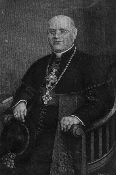 Bohumil Stašek (1886 - 1948), Český římskokatolický kněz a politik.